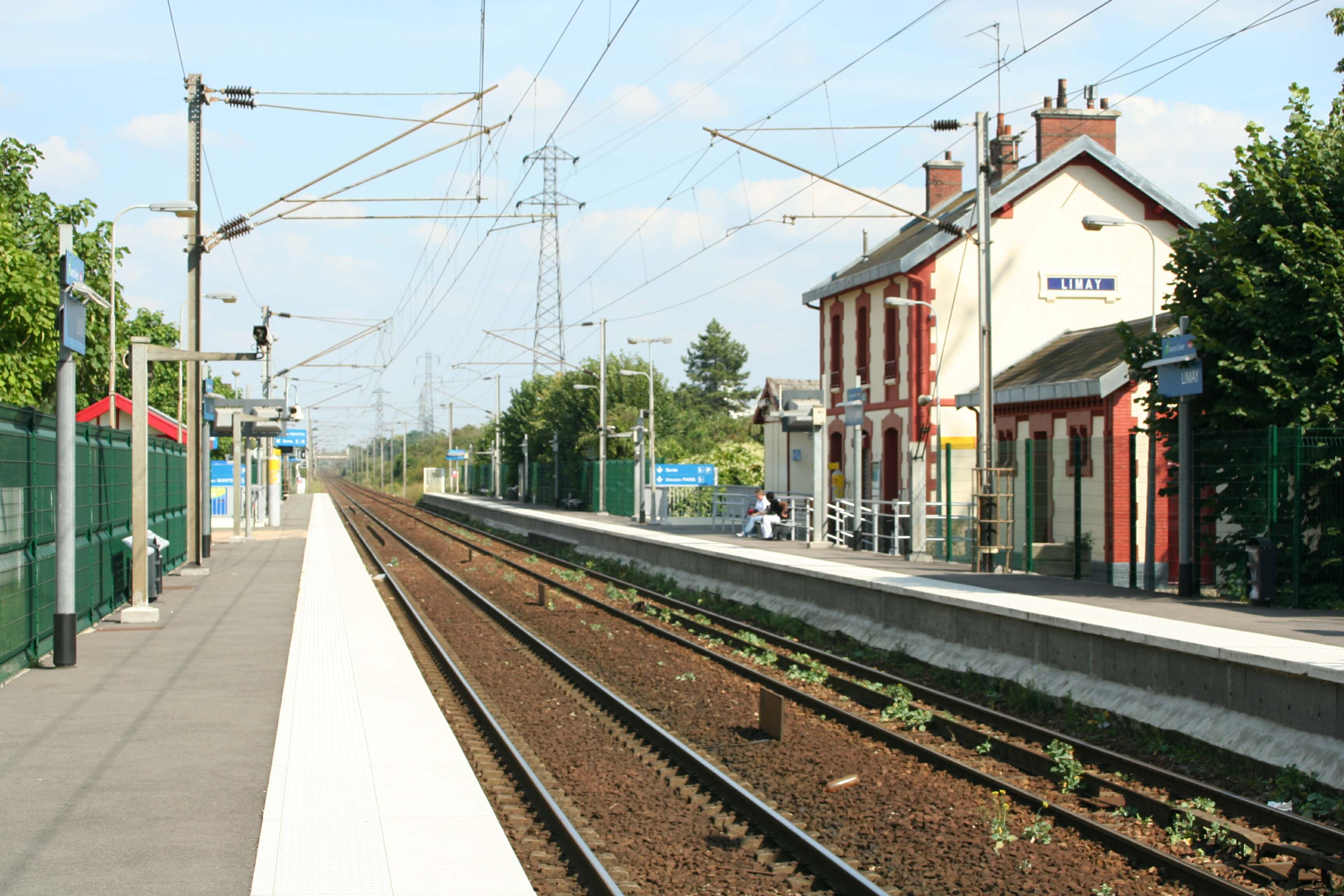 Gare de Limay, Yvelines (France)